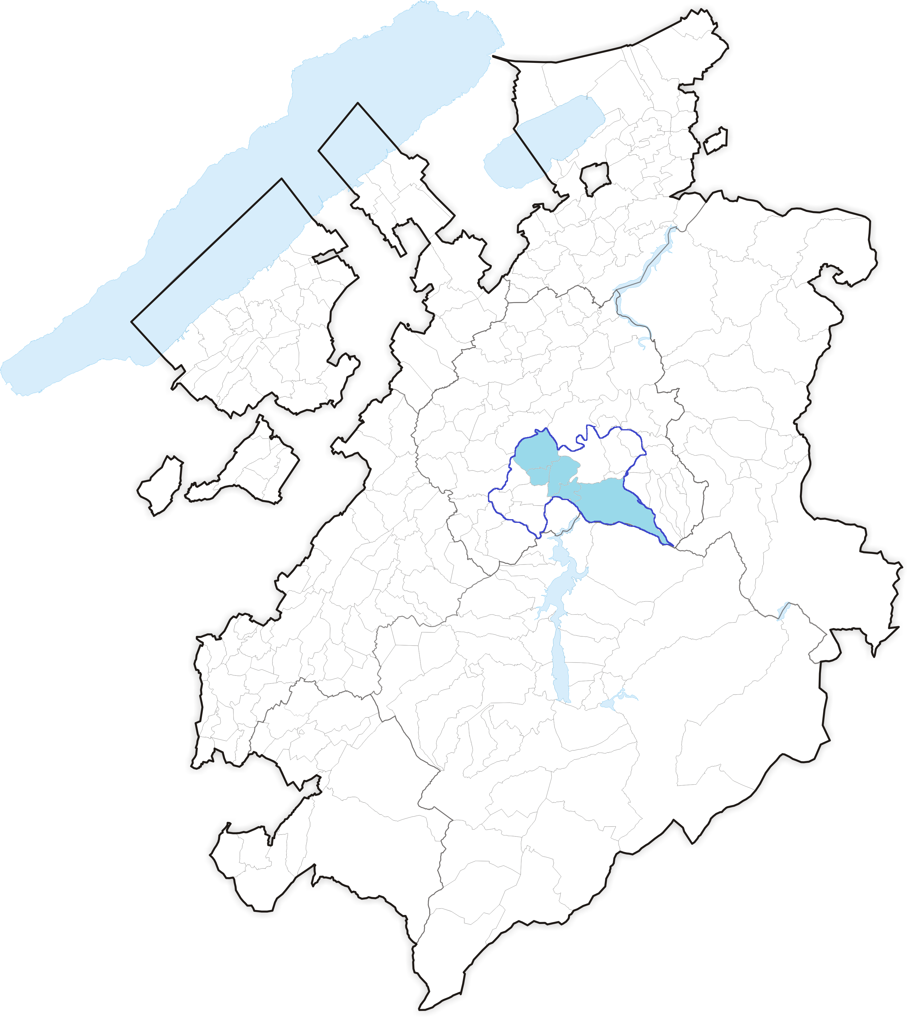 Le bailliage d'Illens (bleu clair) est issu du partage de la seigneurie d'Arconciel (bleu foncé)